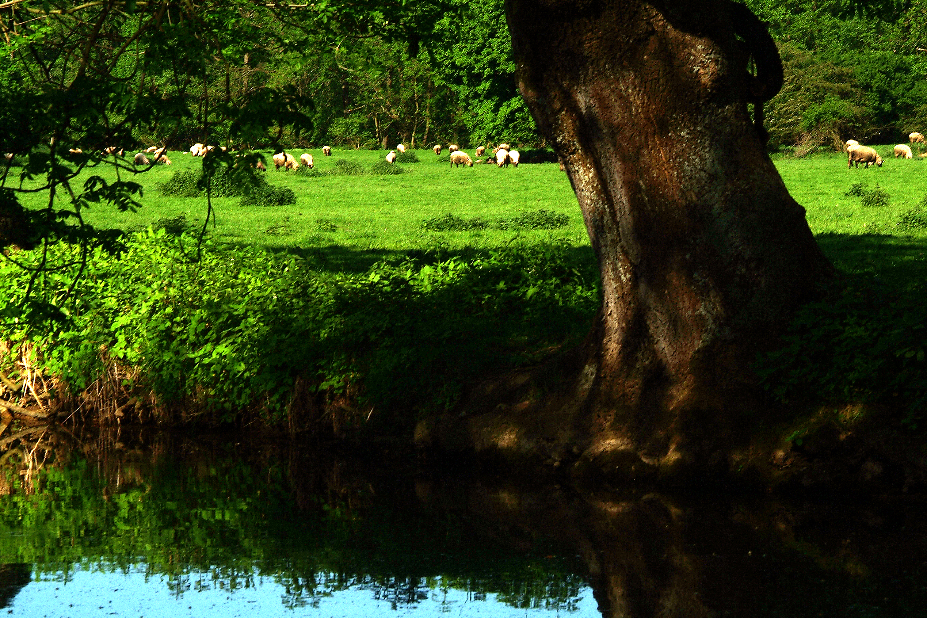 Schafweide an der Emmer im Naturschutzgebiet „Emmertal“, gesehen von der Brückenstraße von Emmerthal-Hämelschenburg – Ansicht aus Emmerthal-Hämelschenburg, der Ortschaft rund um Schloss Hämelschenburg mit ihren jahrhundertealten Geschichten bis in die Gegenwart.